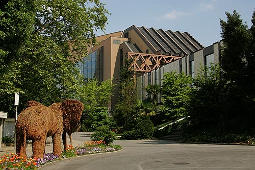 Centre de Congrès